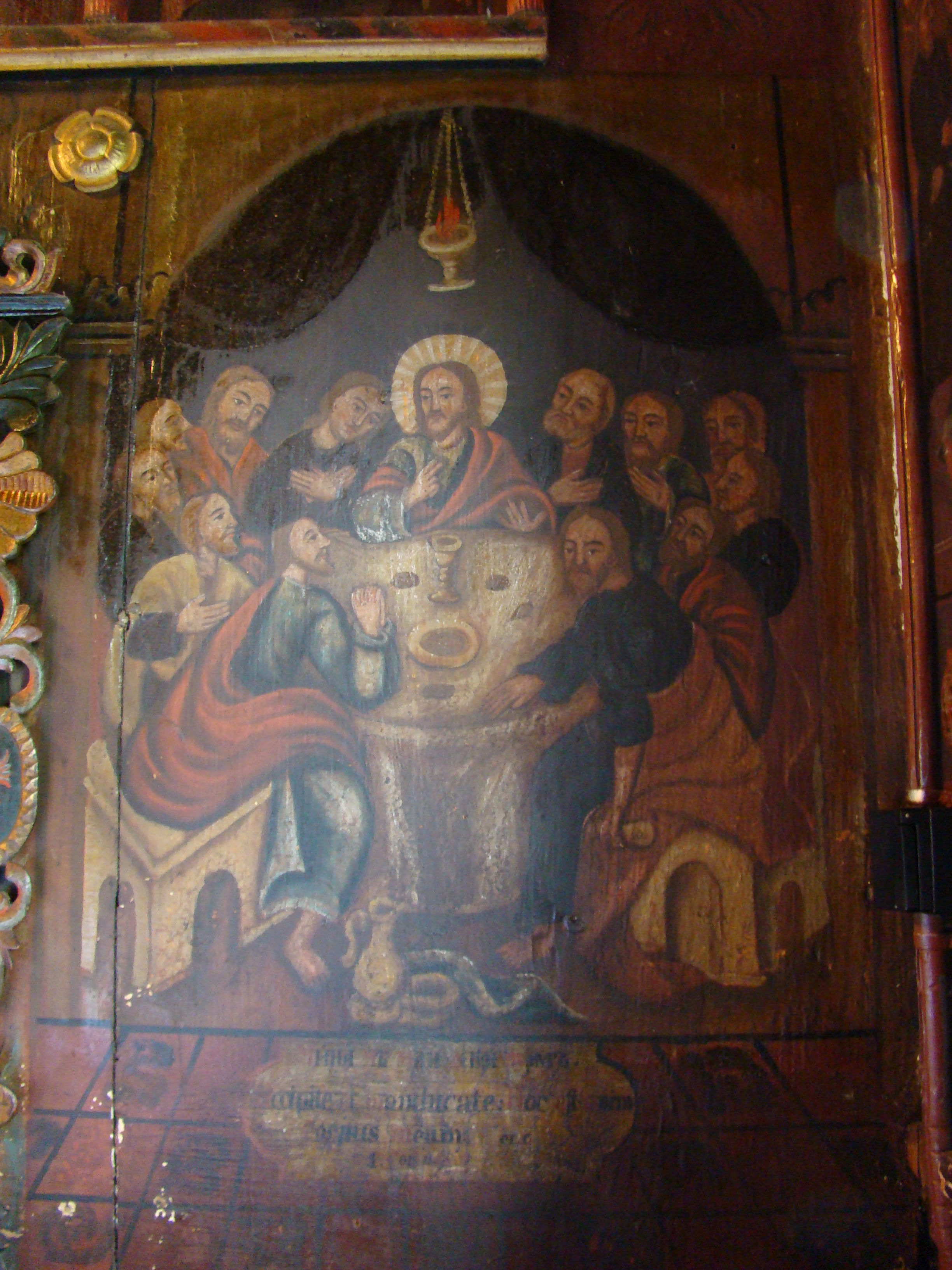 Biserica „Sf. Arhangheli Mihail și Gavriil” din Răstoci”, județul Sălaj